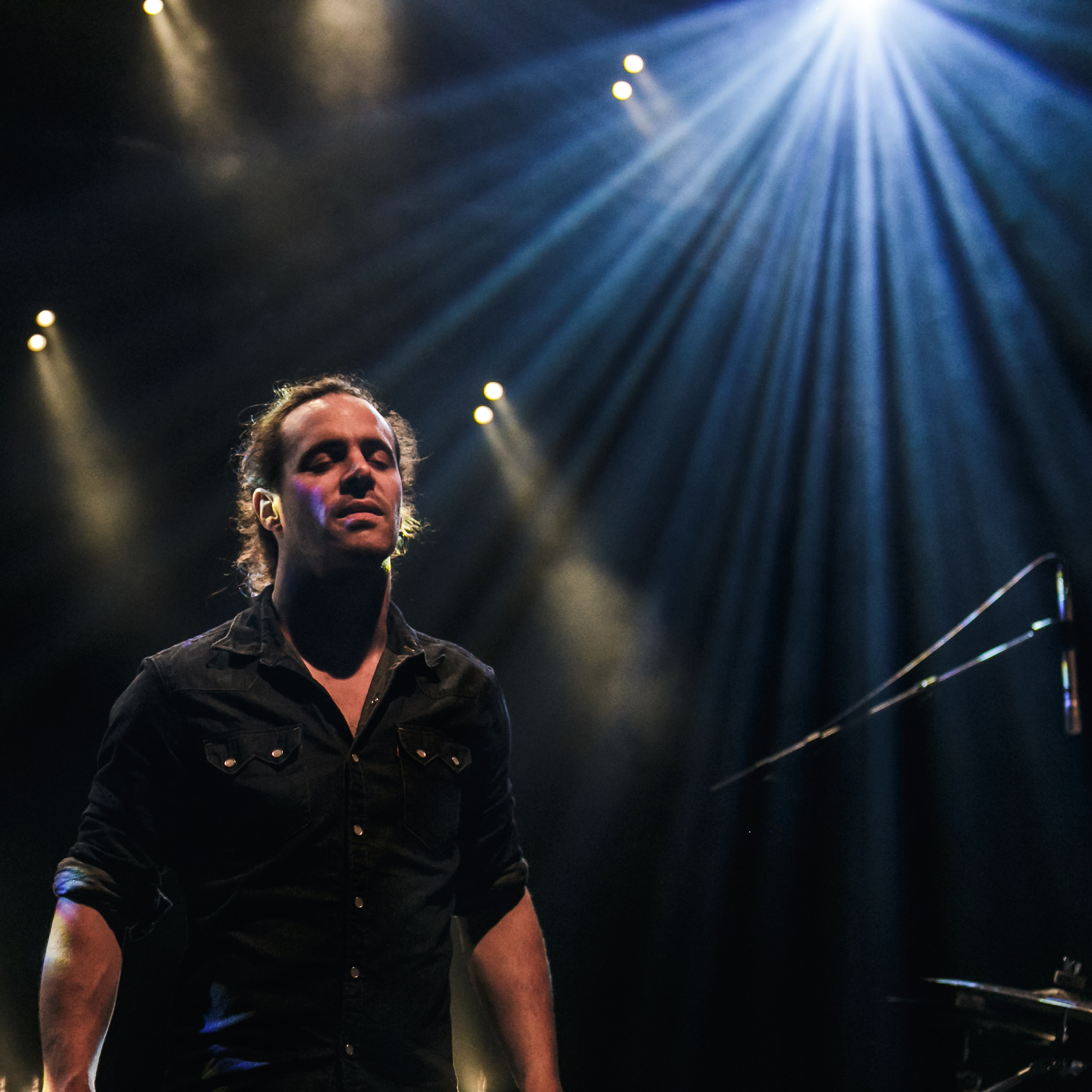 Krismenn en concert au Novomax dans le cadre du festival de Cornouaille à Quimper le 19 juillet 2017.